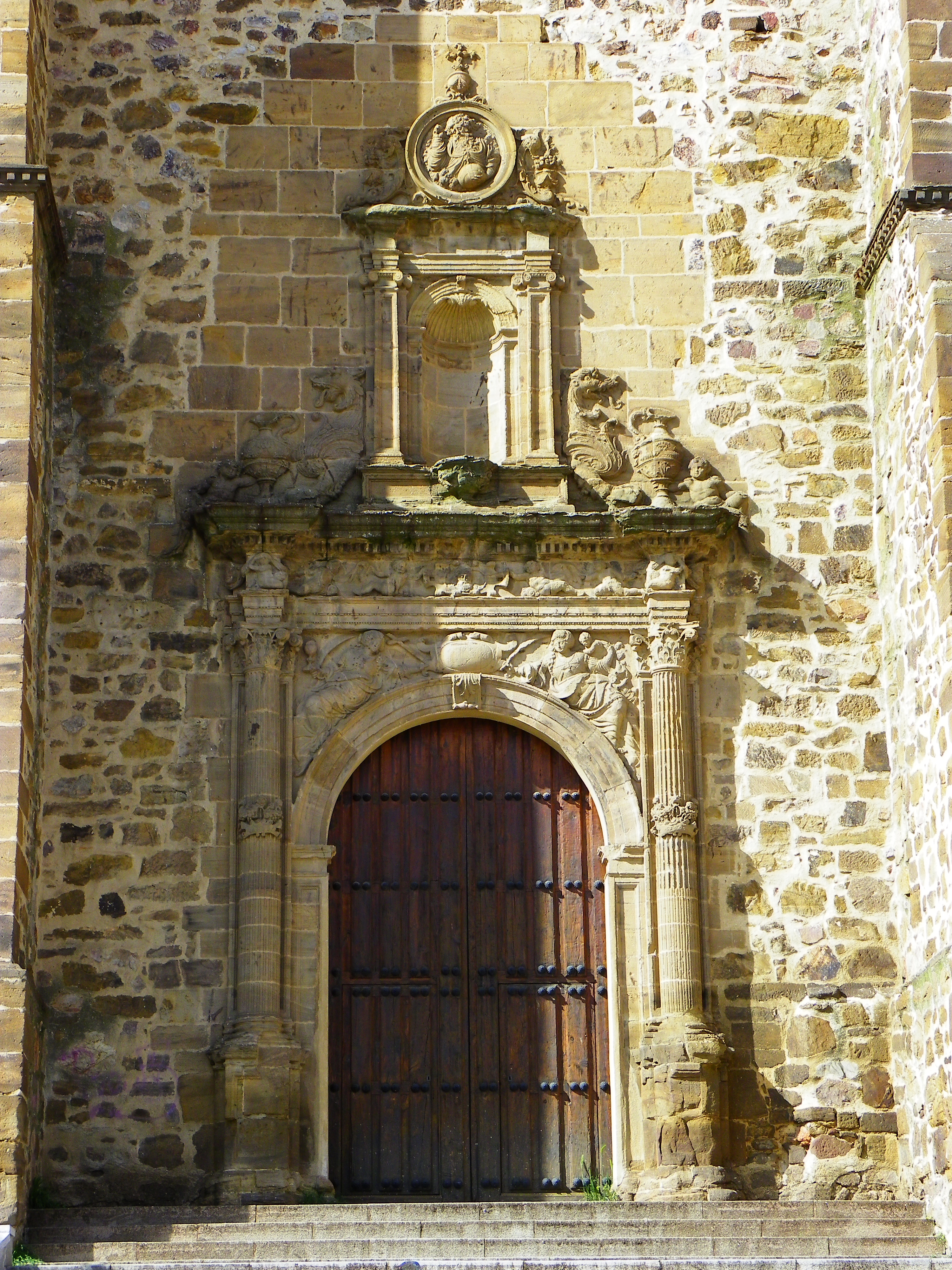 Portada Sur de la Iglesia de la Asunción de Puertollano